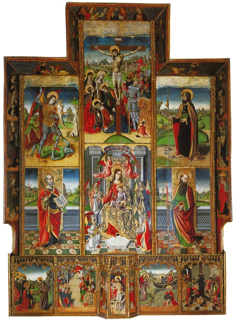 Retaule de Sant Pere. Obra ubicada a l'església de Sant Pere a Tuili (Sardenya)